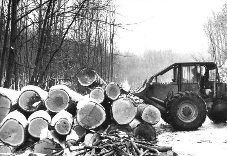 Trostadt, Poltern von Bruchholz ADN-ZB Schaar 13.2.1987 Bez. Suhl: "Forstarbeiter auf Zeit" sind gegenwärtig zahlreiche Genossenschaftsbauern des Bezirkes Suhl. Sie unterstützen die Forstarbeiter bei der Aufbereitung von Schadholz in den Thüringer Wäldern. Rücketraktoren schieben das Holz vor dem Abtransport zusammen. In den vergangenen fünf Jahren konnten durch die Hilfe der Bauern 135.000 Kubikmeter Holz von Wind- und Schneebrüchen aus den Forsten geholt werden. Derzeit sind über 50 Bauern aus sechs Genossenschaften des Territoriums in der 6.000 Hektar großen Oberförsterei Trostadt tätig. - siehe auch 1987-0213-1N